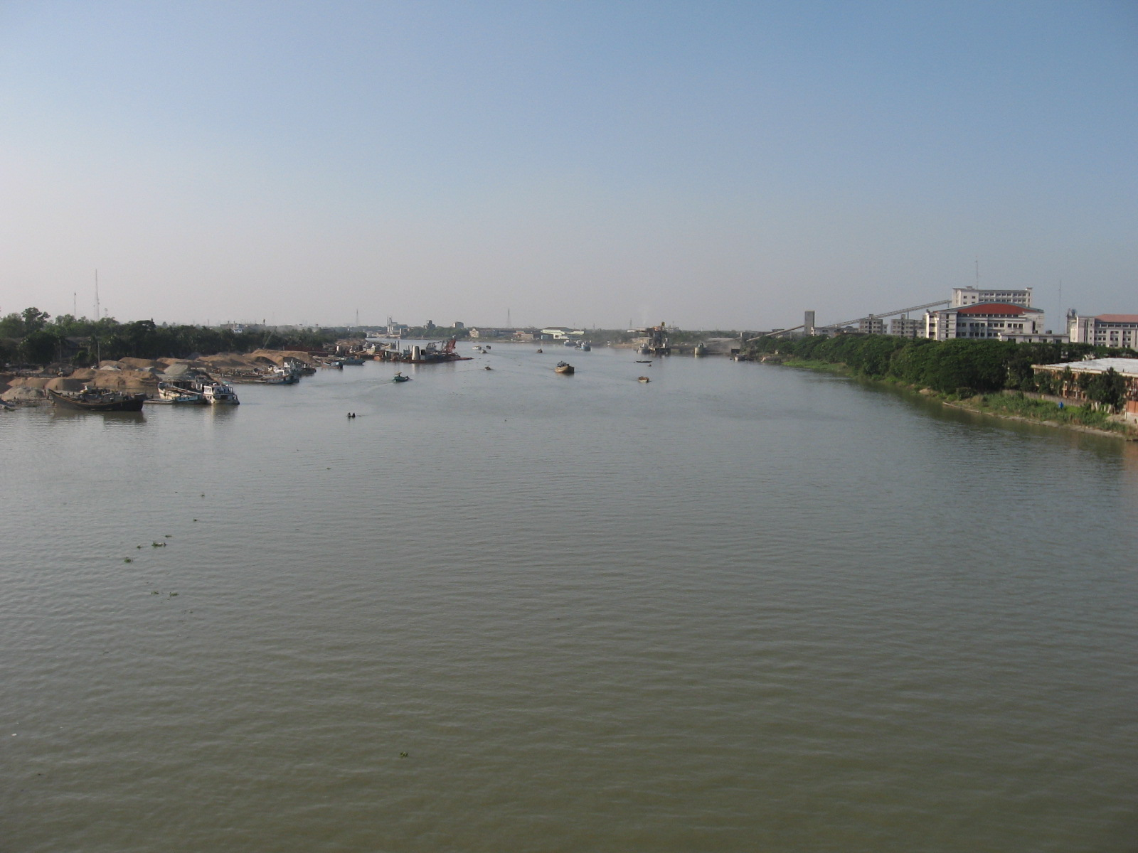 Sitalakhya River near Narayanganj, Bangladesh